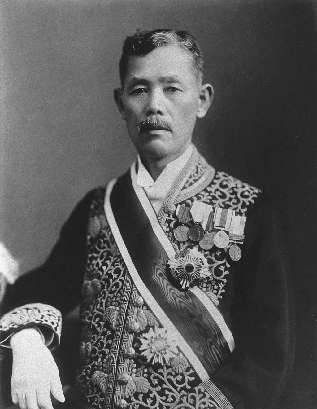 Portrait of Wakatsuki Reijiro (若槻礼次郎, 1866 – 1949)